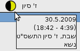 Hebrew calendar (hdate-applet) in linux